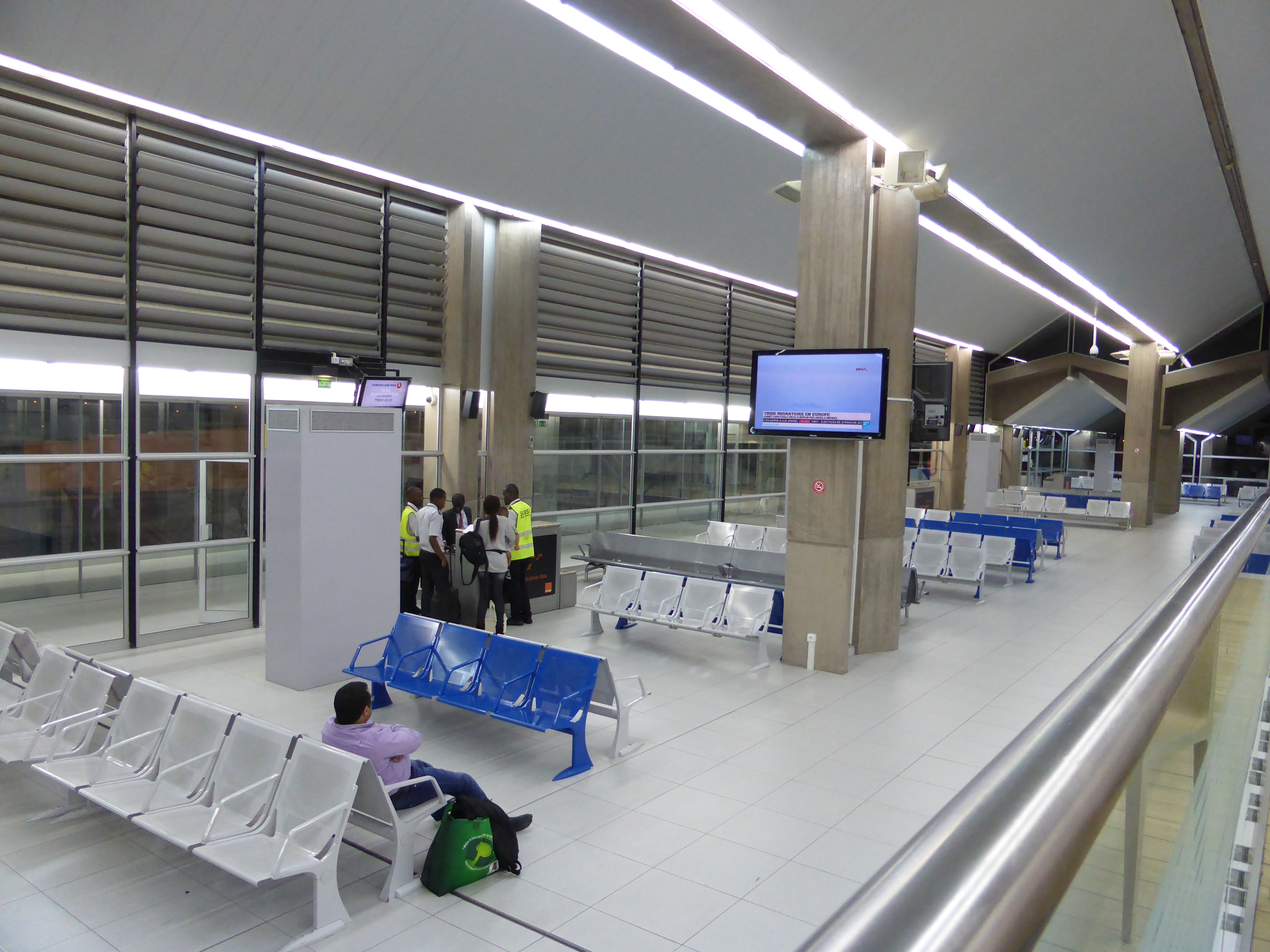 Hall d'embarquement de l'Aéroport International Félix Houphouët-Boigny à Abidjan